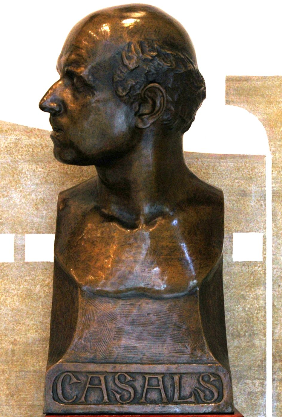 Escultura de Pau Casals al Palau de la Música de Barcelona